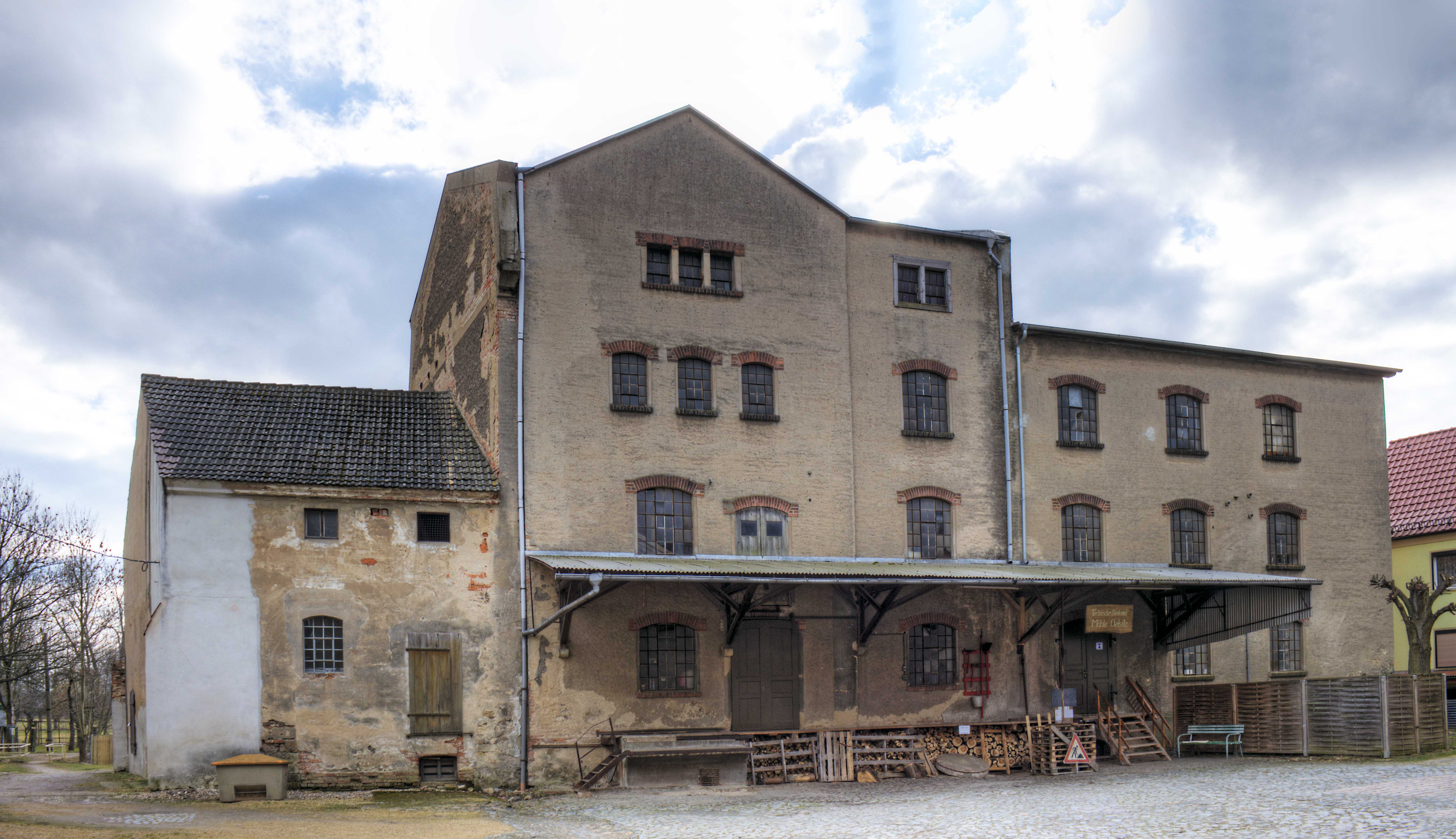 Wassermühle, Riesaer Straße 25 in Riesa Stt. Oelsitz